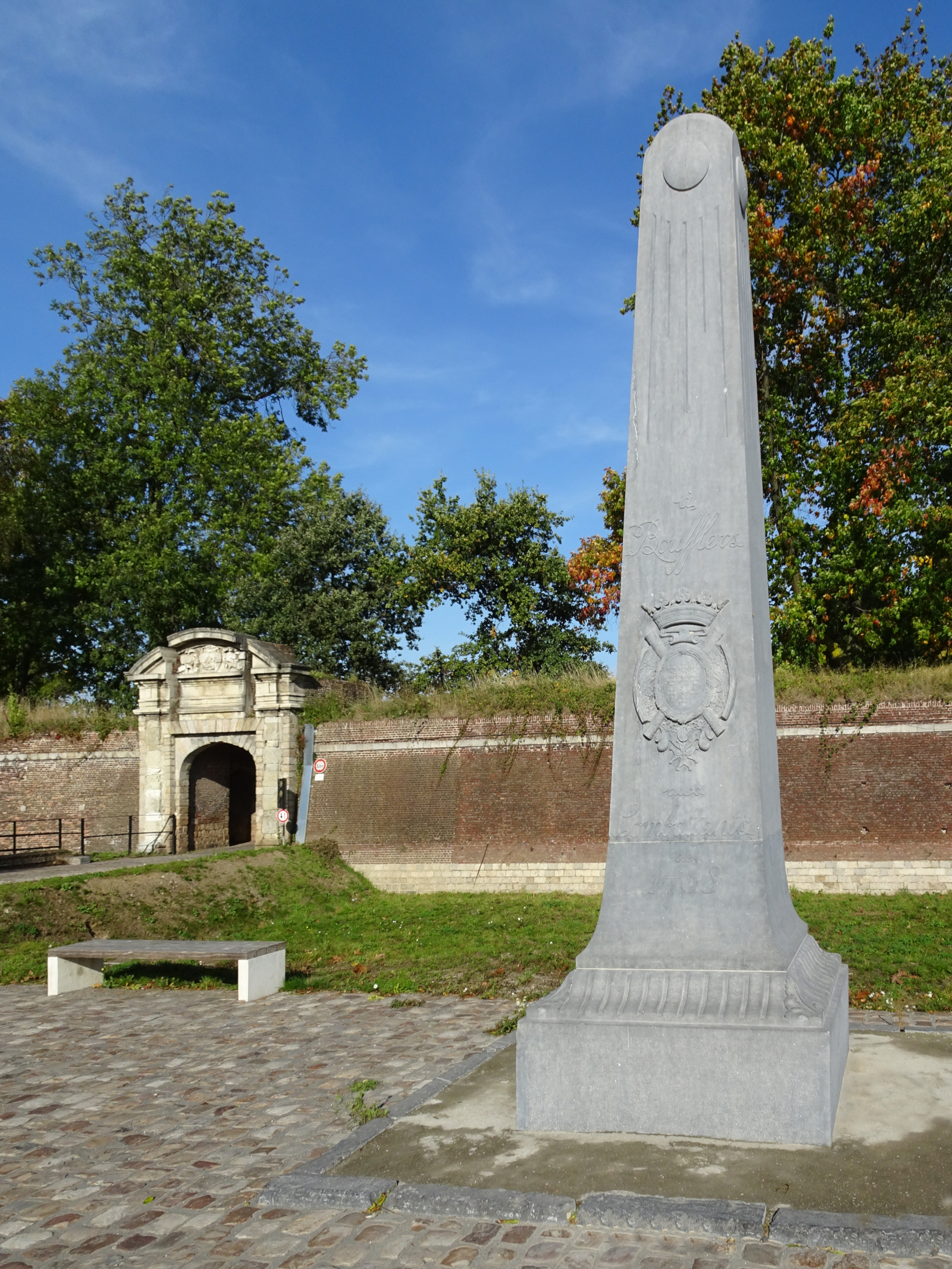 Obélisque commémorant le maréchal Boufflers, commandant de la citadelle lors du siège de 1708, inaugurée pour fêter le bicentenaire du siège, à Lille Hauts-de-France France.